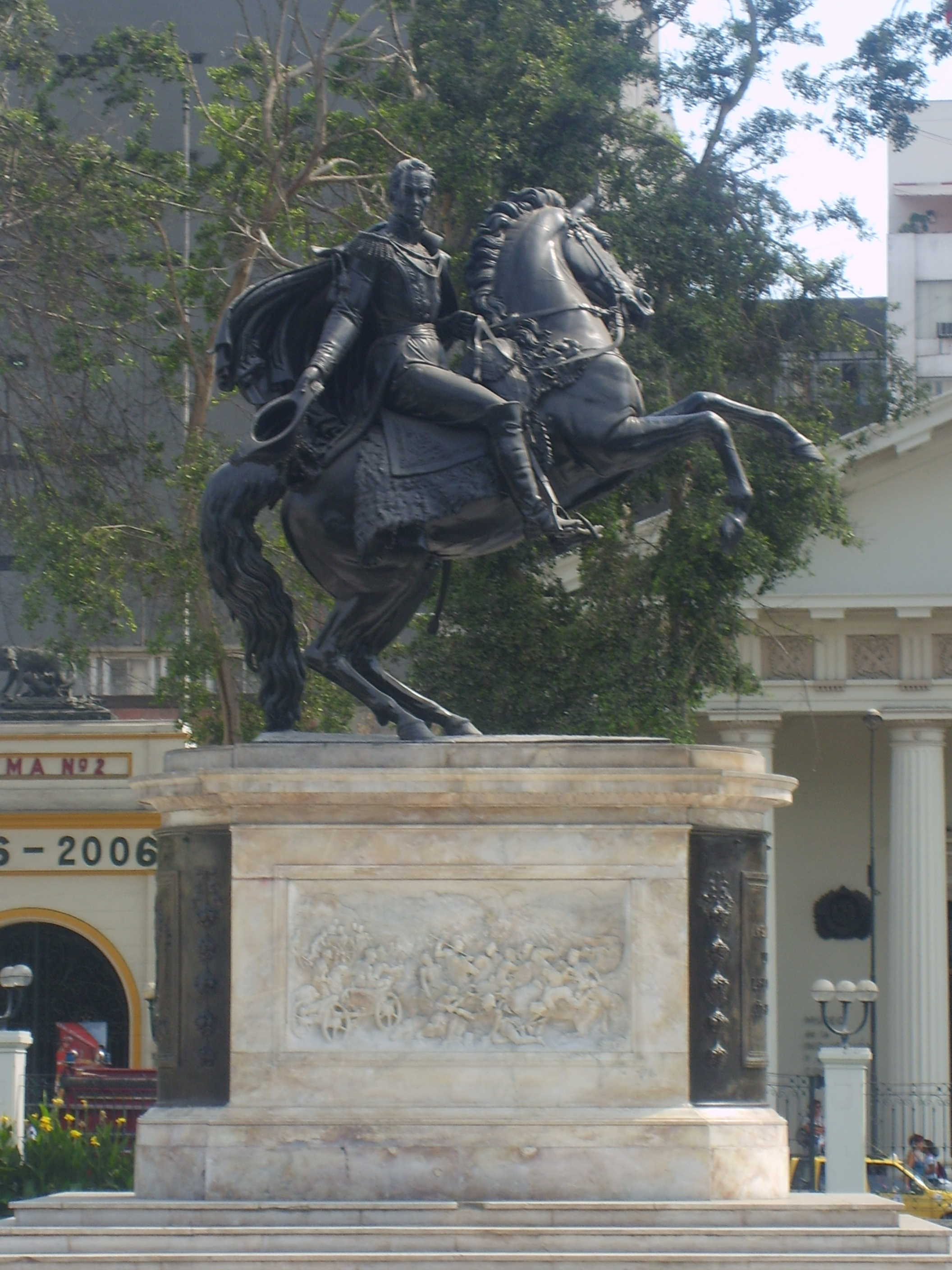 Monumento al Libertador del Perú Don Simón Bolivar en la Plaza del Congreso en Lima, Perú. Fotografía obtenida por el Usuario Valo en la ciudad de Lima, el 3 de marzo de 2007